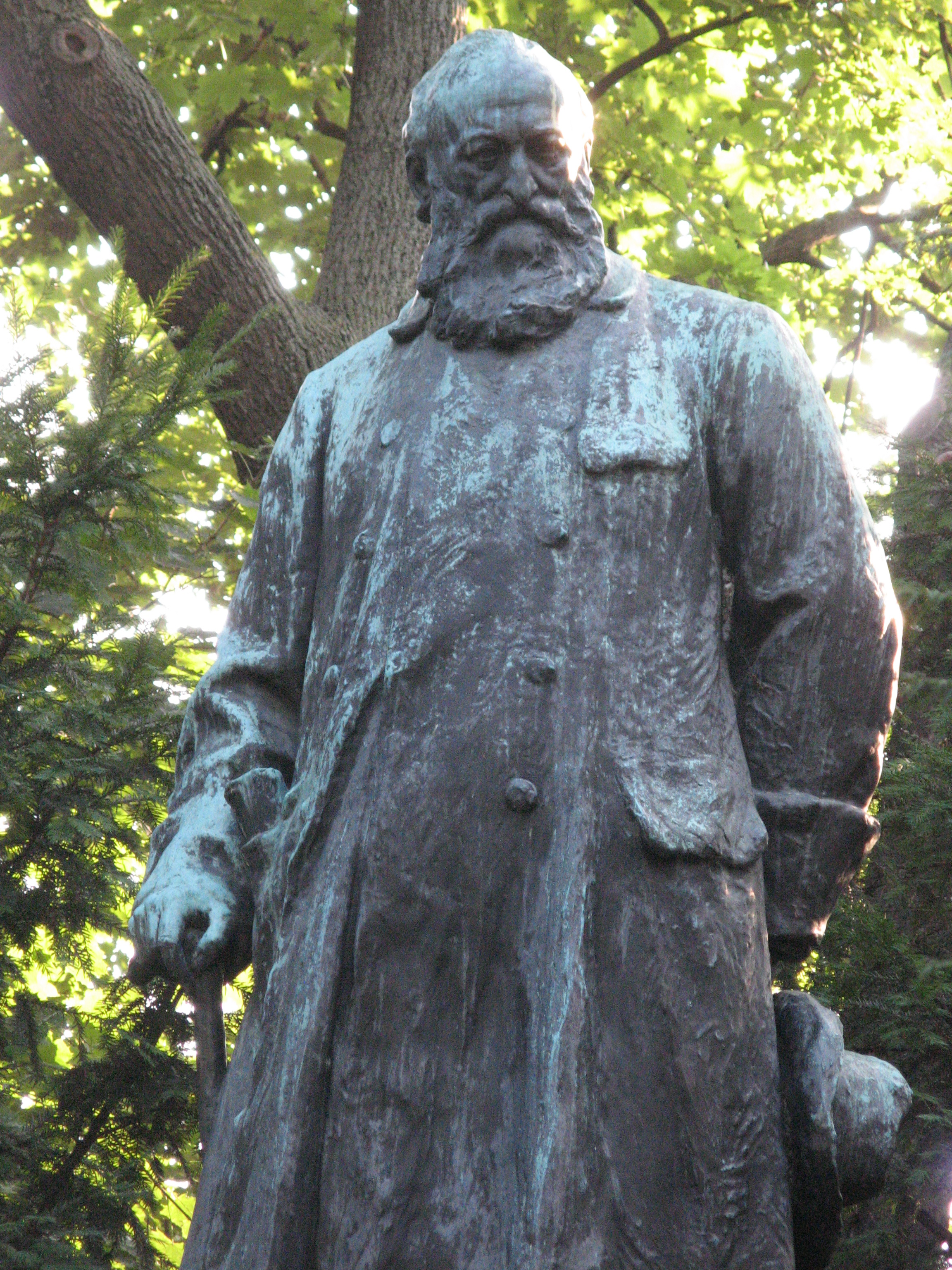 Anzengruber-Denkmal (1905) von Johann Scherpe, Schmerlingplatz, Wien-Innere Stadt